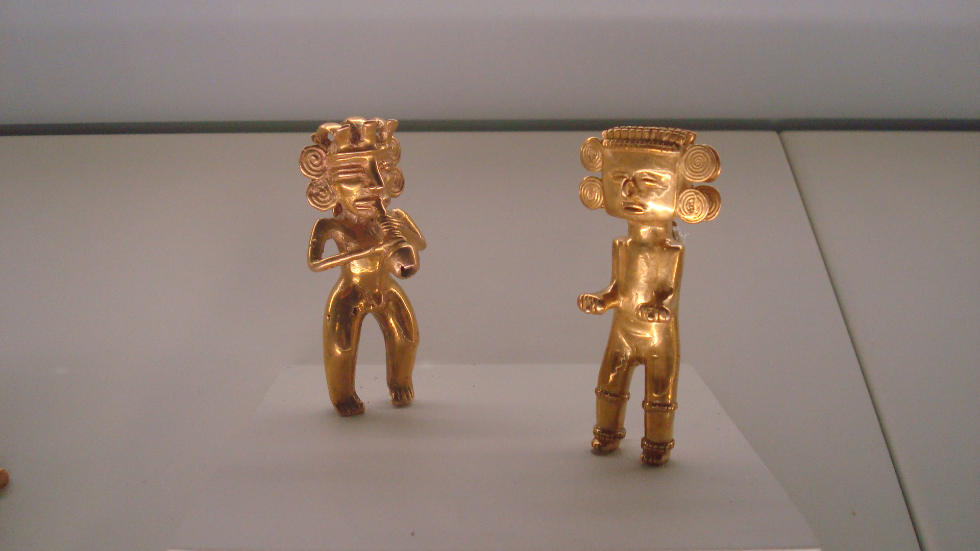 Objetos precolombinos de oro de Costa Rica, tipo Quimbaya, propios del Caribe colombiano, encontrados en el Caribe costarricense. La figura de la izquierda, que representa a un músico, es hueca, mientras que el danzante de la derecha es sólida. 300-700 d.C. Museo del Oro Precolombino de San José.